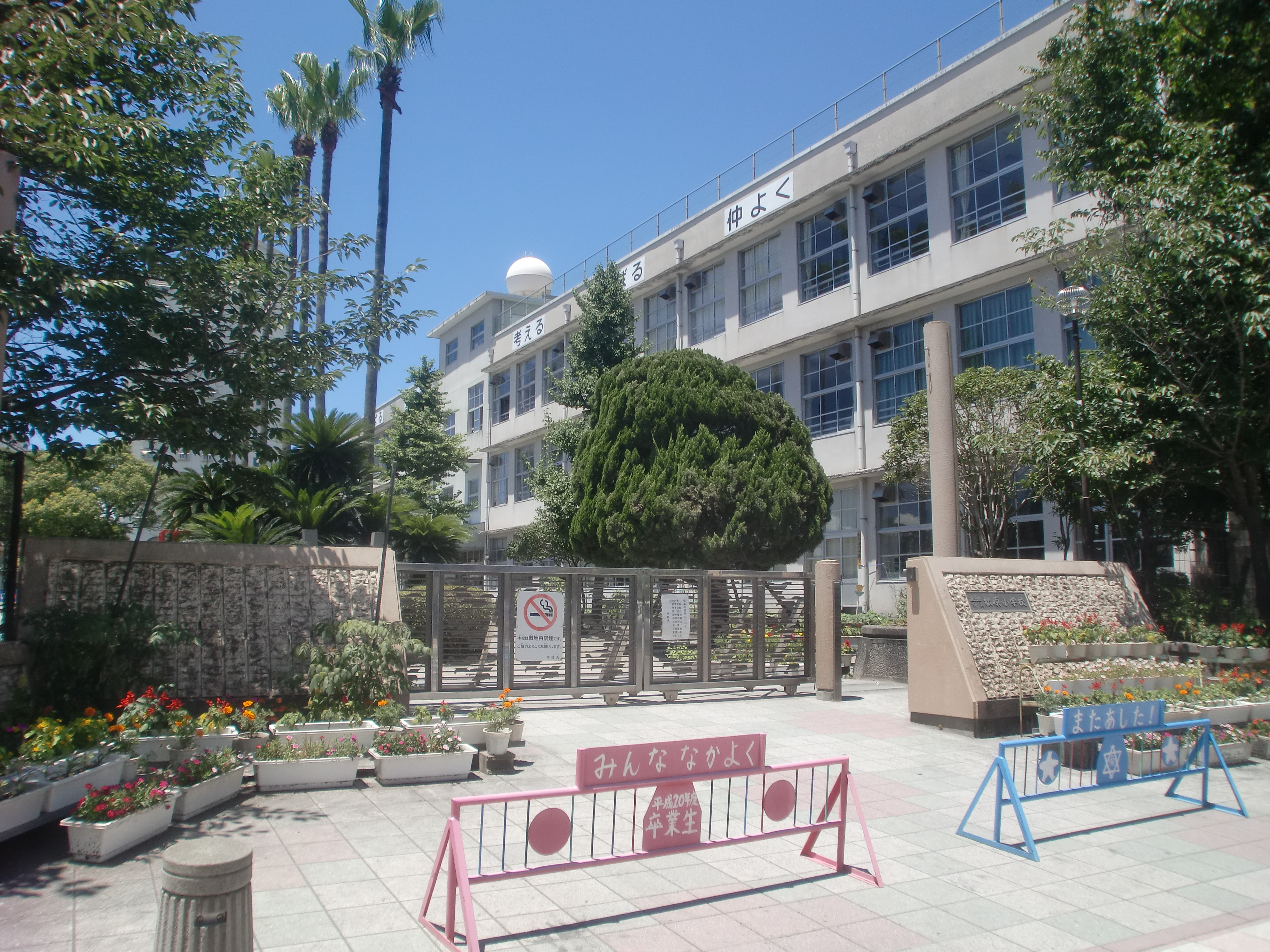 鹿児島市立松原小学校外観